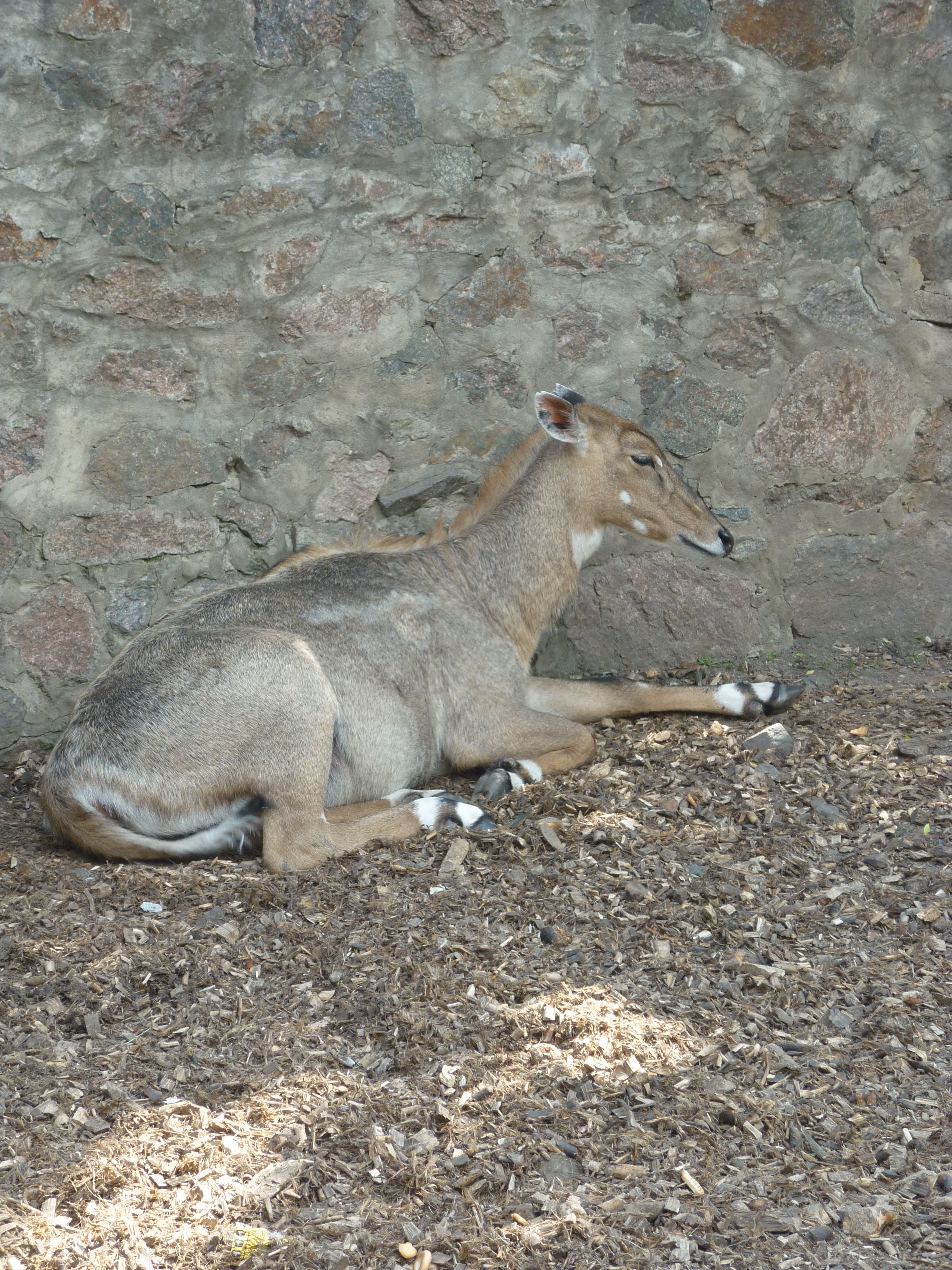 Черкаський зоопарк: антилопа нільгау